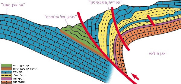 חתך בהרי היורה המראה את קמטי "כובעו של הז'נדרם" ו"פטריית השמפיניון"